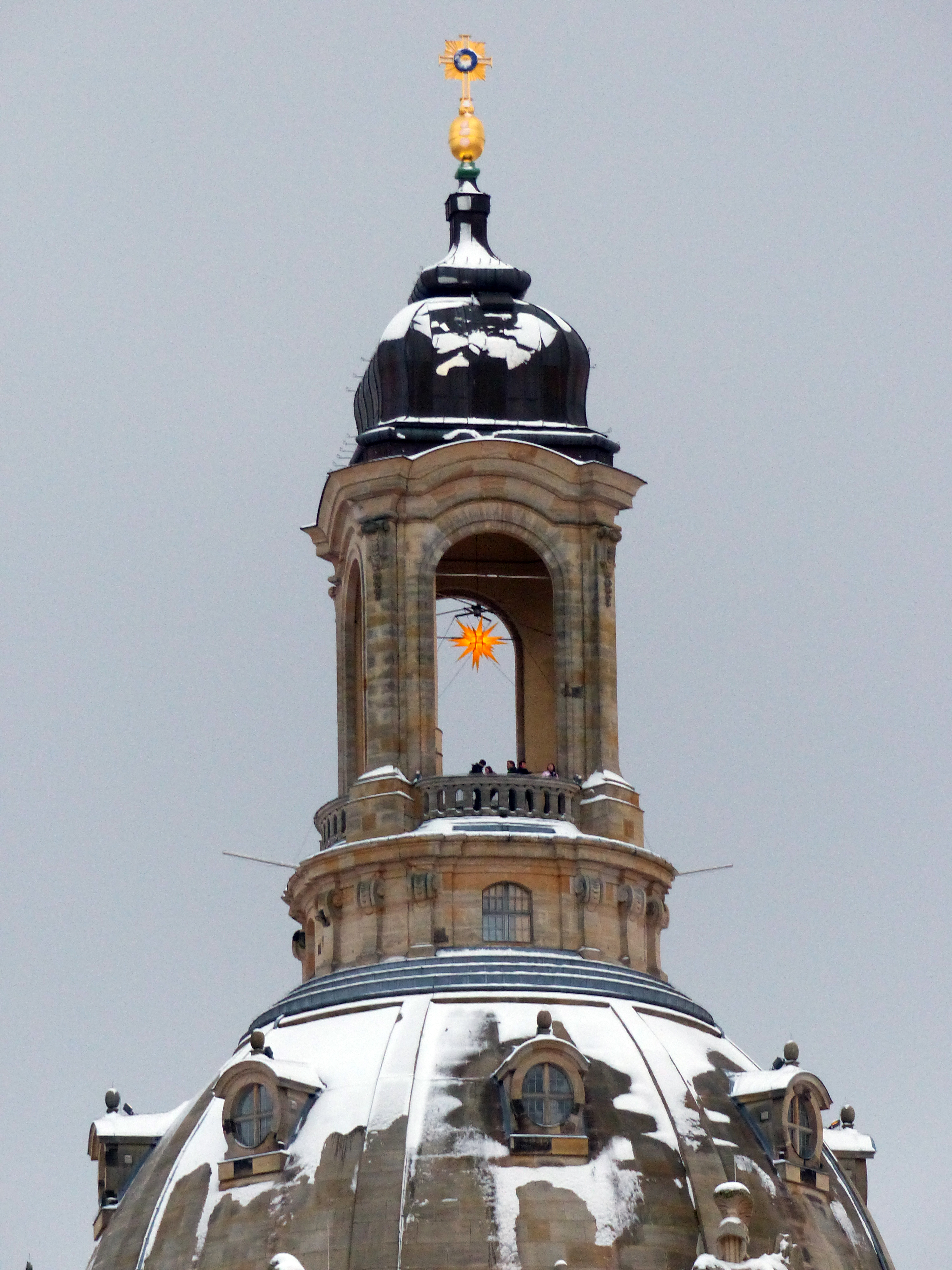 Kuppel der Frauenkirche mit Herrnhuter Stern und Schnee, Dresden